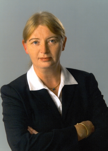 Bild von Frau Dr. Uta Rensch, Oberbürgermeisterin von Freiberg (Sachsen)